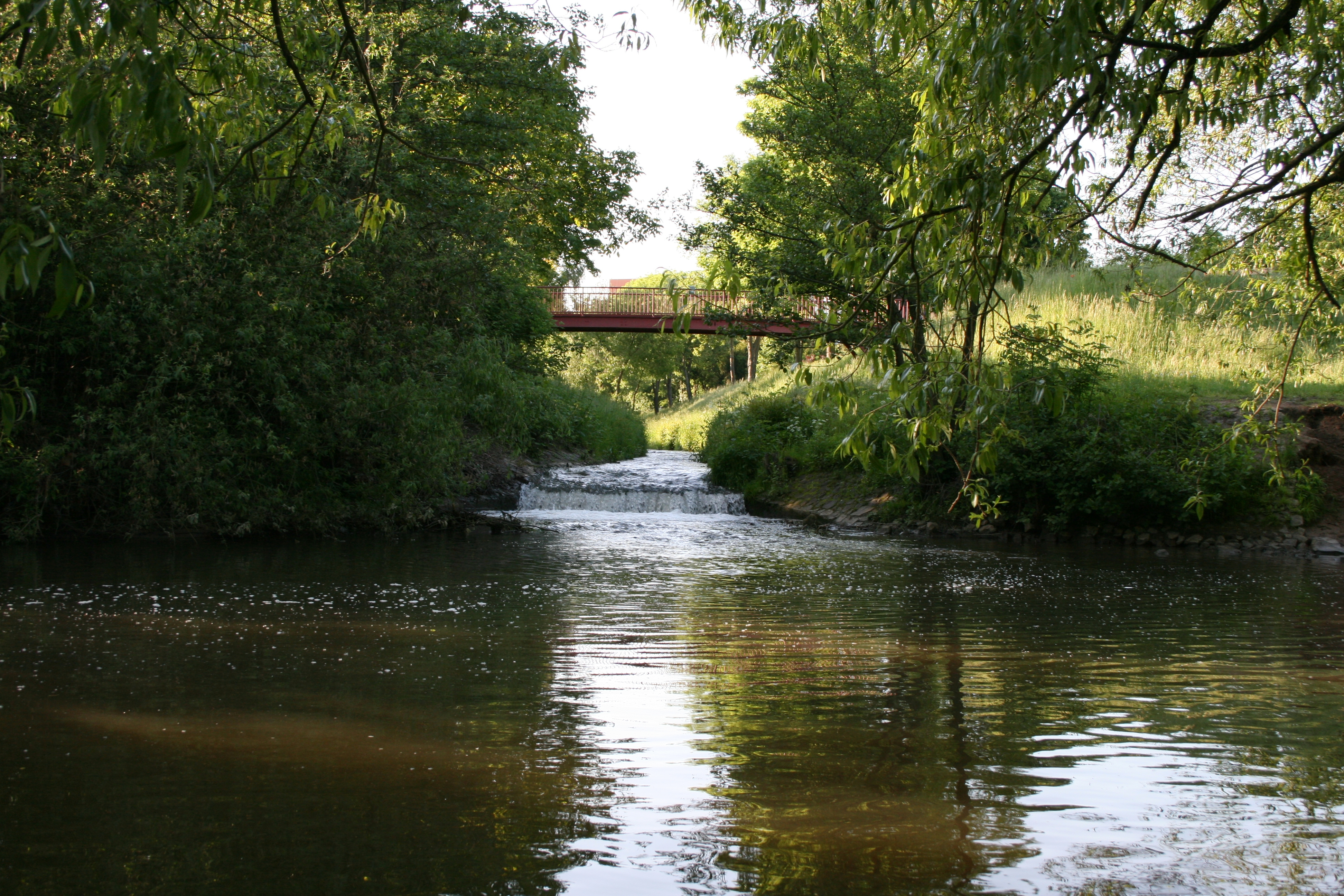 Mündung der Fallbach in die Kinzig in Hanau, Hessen.